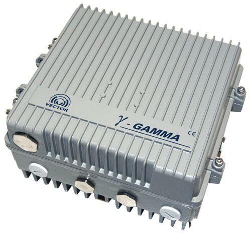 Przykład węzła optycznego stosowanego w sieciach HFC